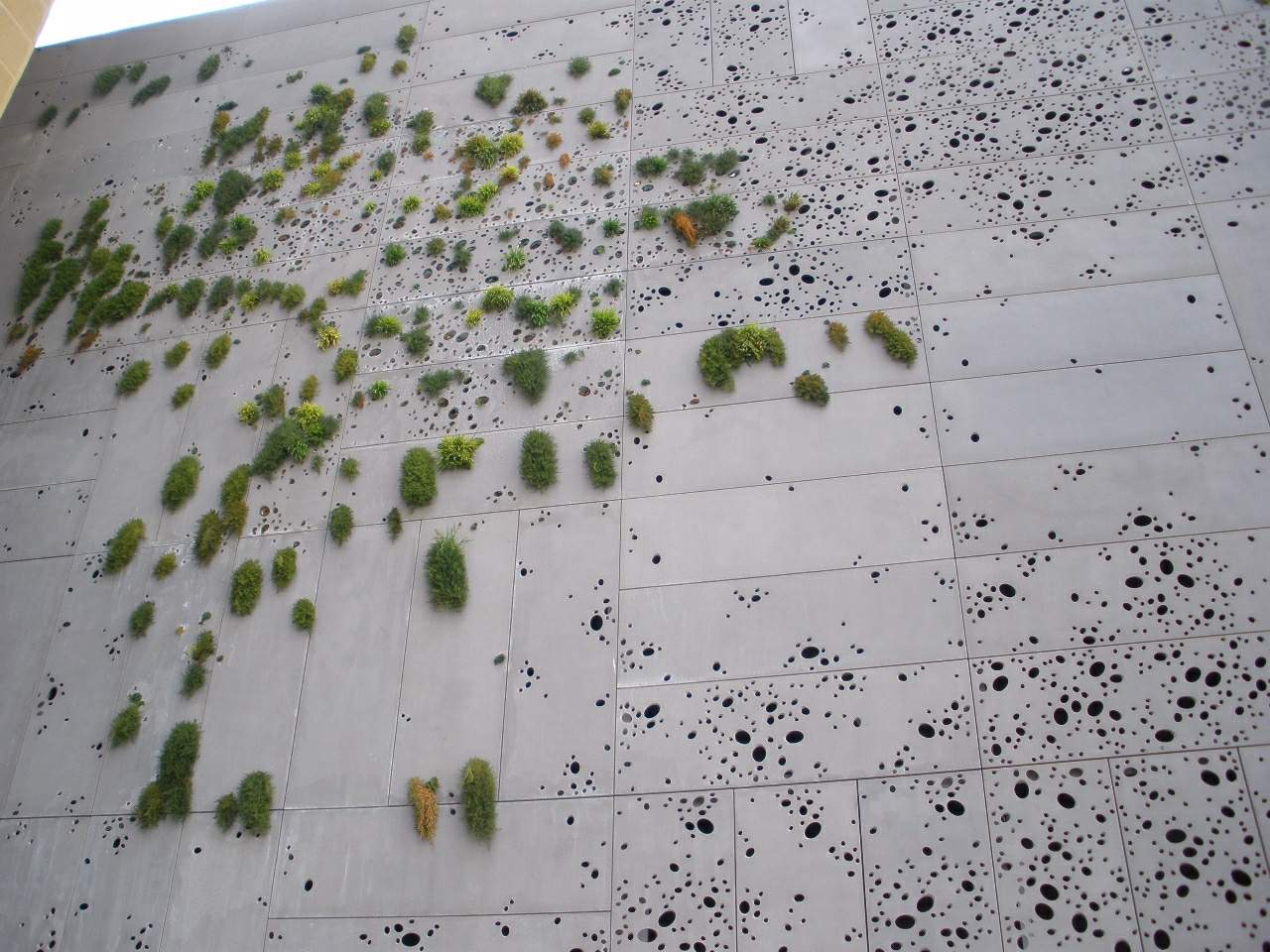 Museo y antiguo Monasterio de San Telmo (San Sebastián)